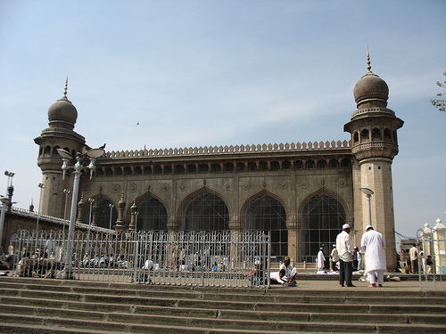 La Mecca Masjid, plus grande mosquée d'Hyderabad en Inde.